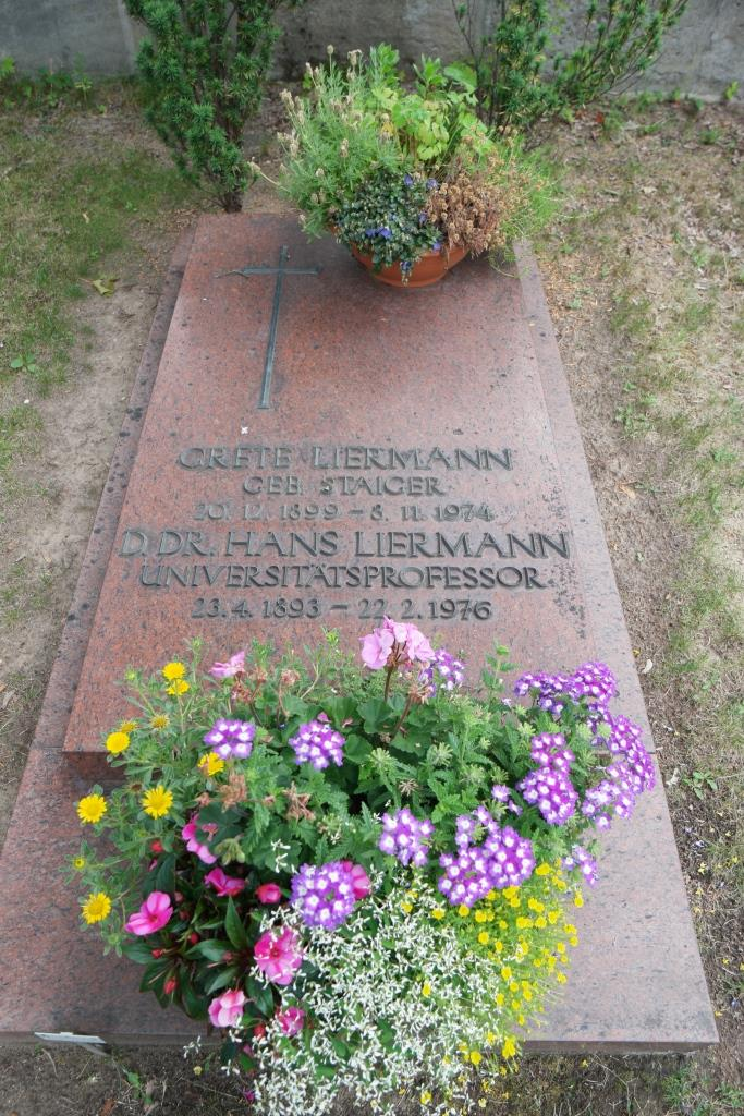 Grab des Juristen Hans Liermann, 1893-1976, auf dem Neustädter Friedhof in Erlangen